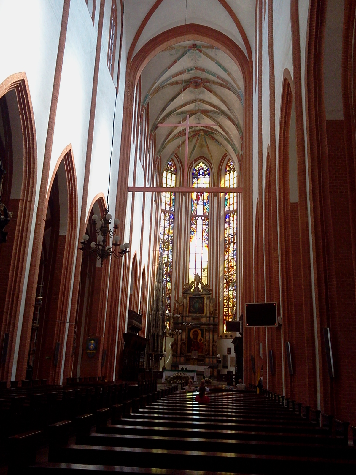 Wrocław, kościół par., ob. garnizonowy p.w. św. Elżbiety, 1 ćw. XIV, 1486